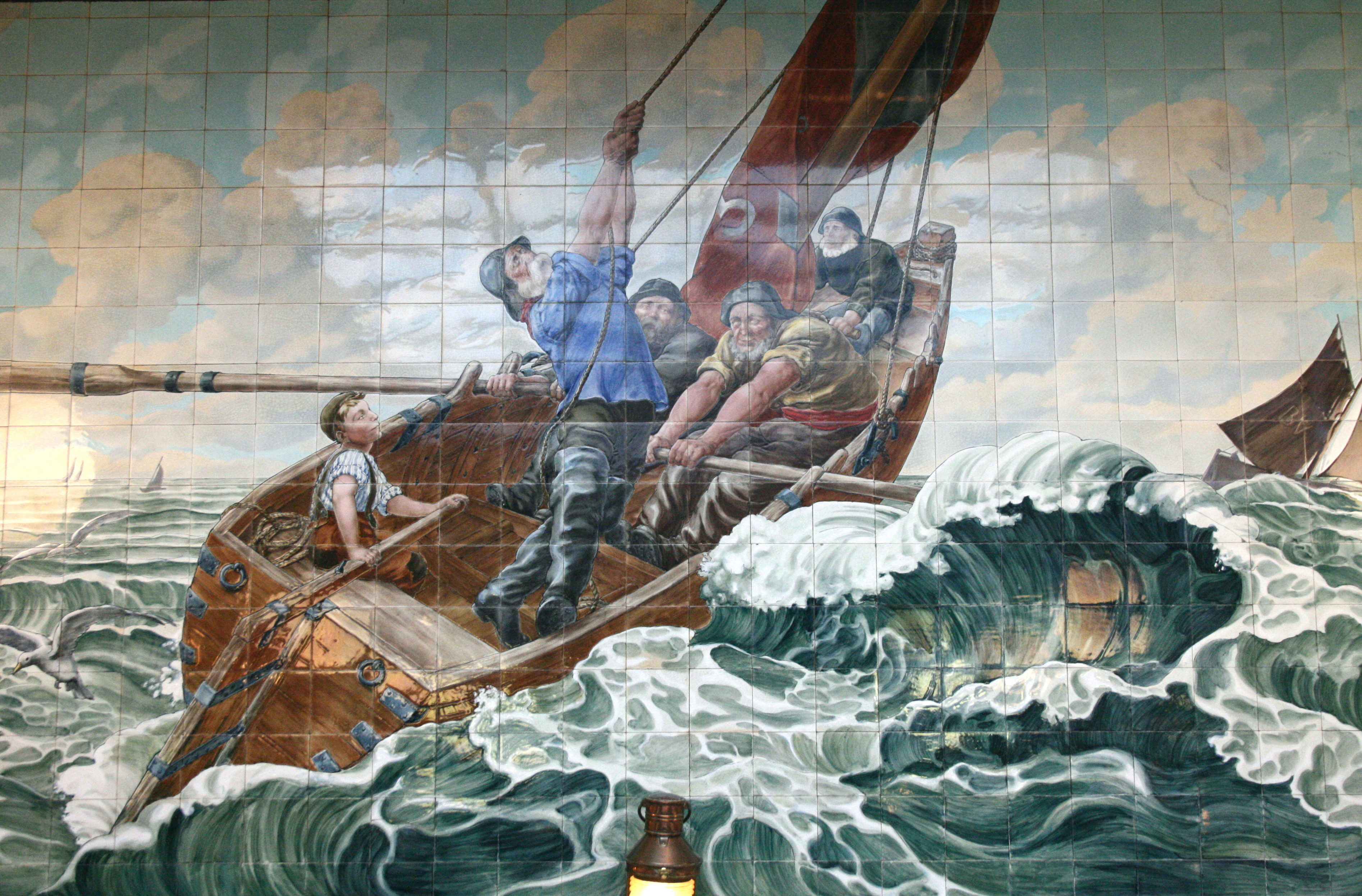 Rue des Dominicains 8-10, Bruxelles (belgique). Rôtisserie Vincent. Décor en céramiques peintes